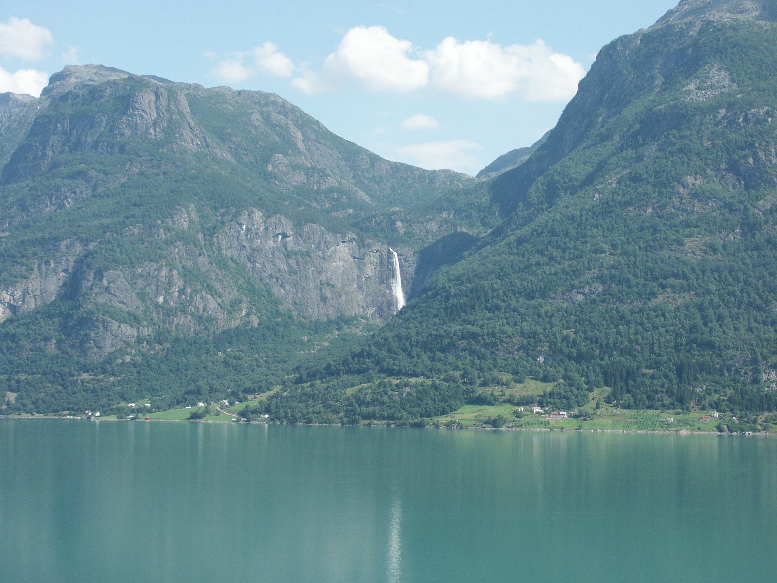 Feigefossen (Feigumfossen) in Luster, Sogn og Fjordane